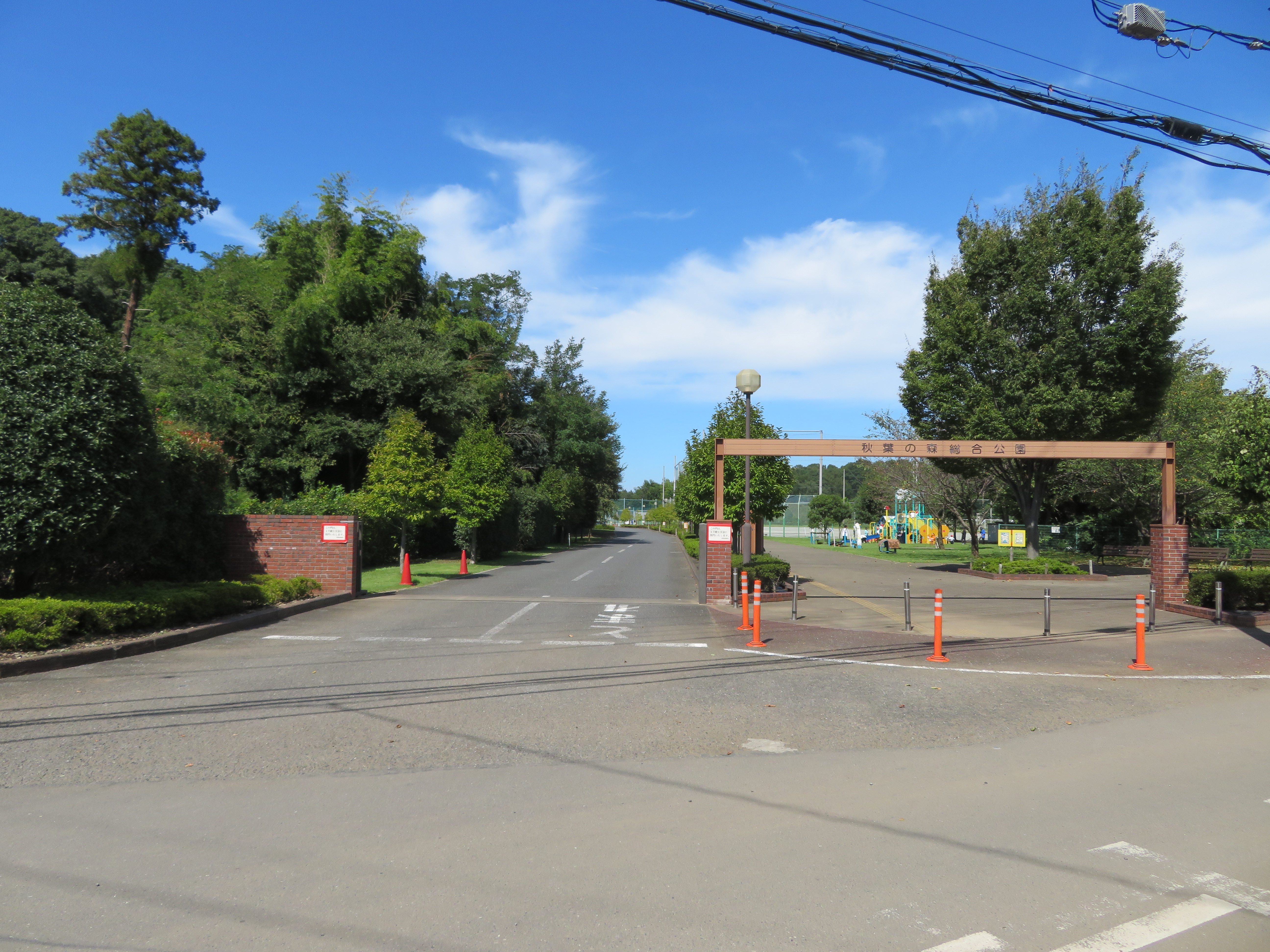 さいたま市西区に所在する秋葉の森総合公園（入口付近） Canon PowerShot SX720 HS